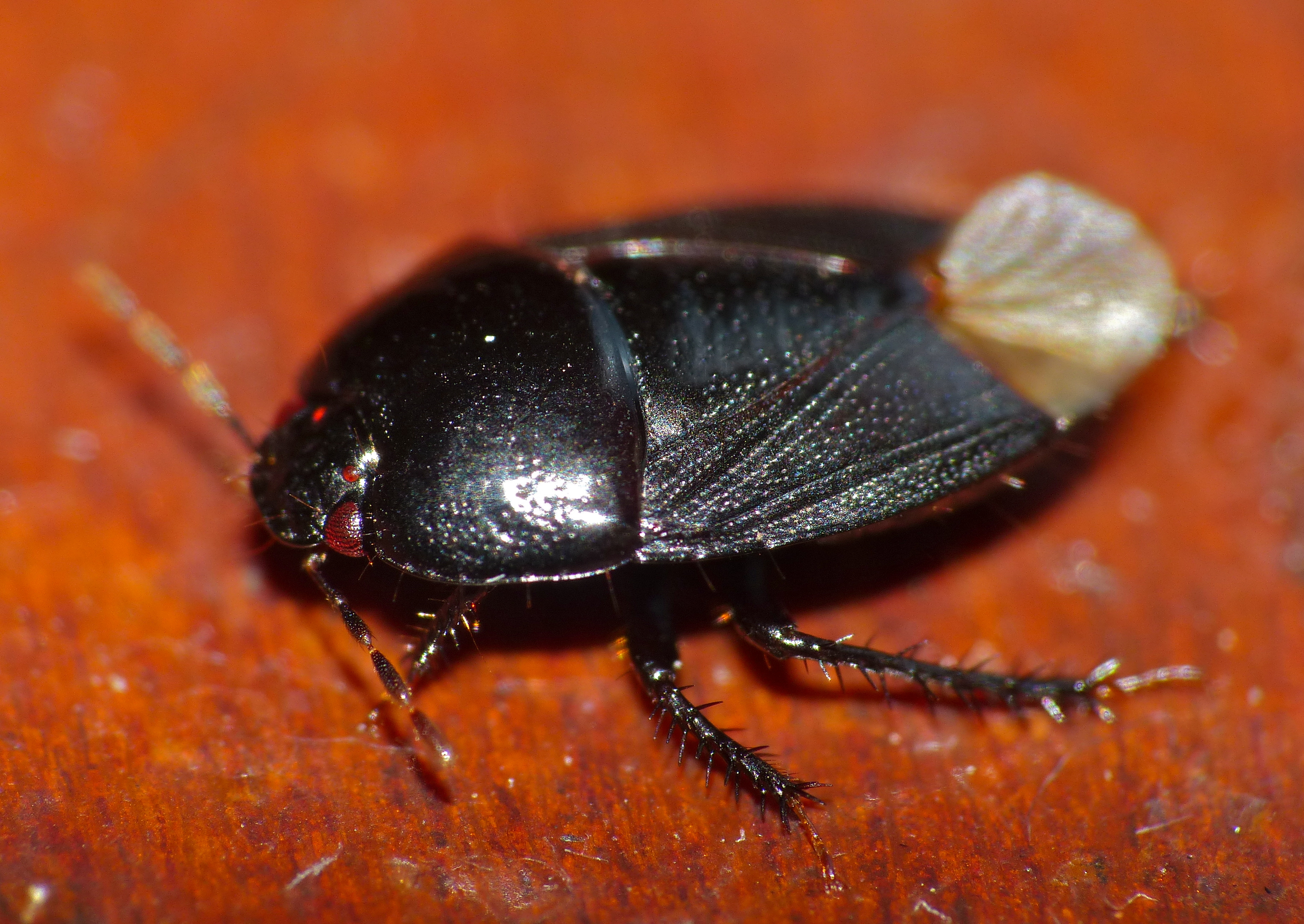 Safari Tent N°7, Letaba Camp, Kruger NP, SOUTH AFRICA